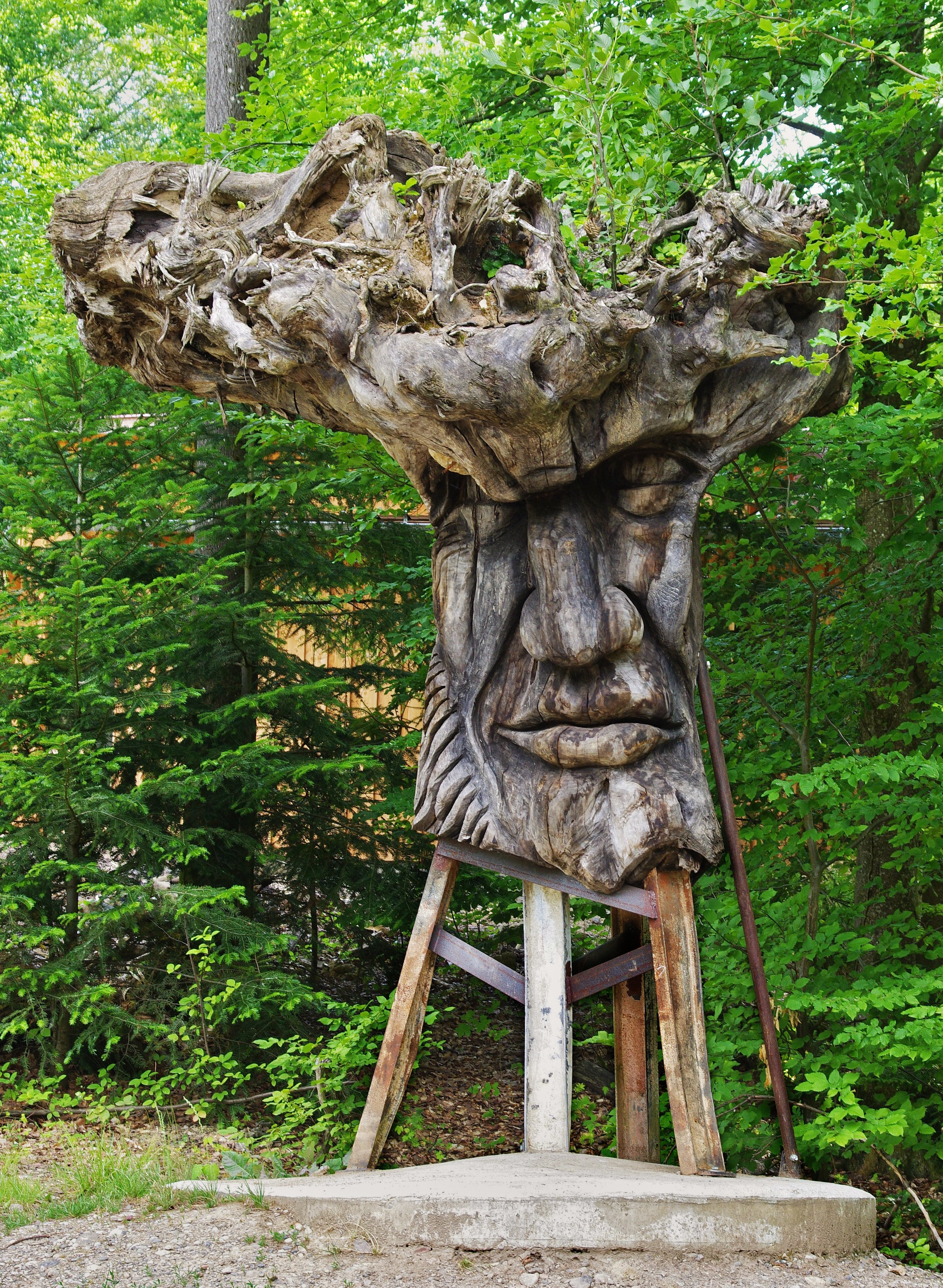 Der Wurzelkopf WaldMenschen von Thomas Rees ein ständige Ausstellung auf dem Skulpturenpfad des Waldhaus Freiburg